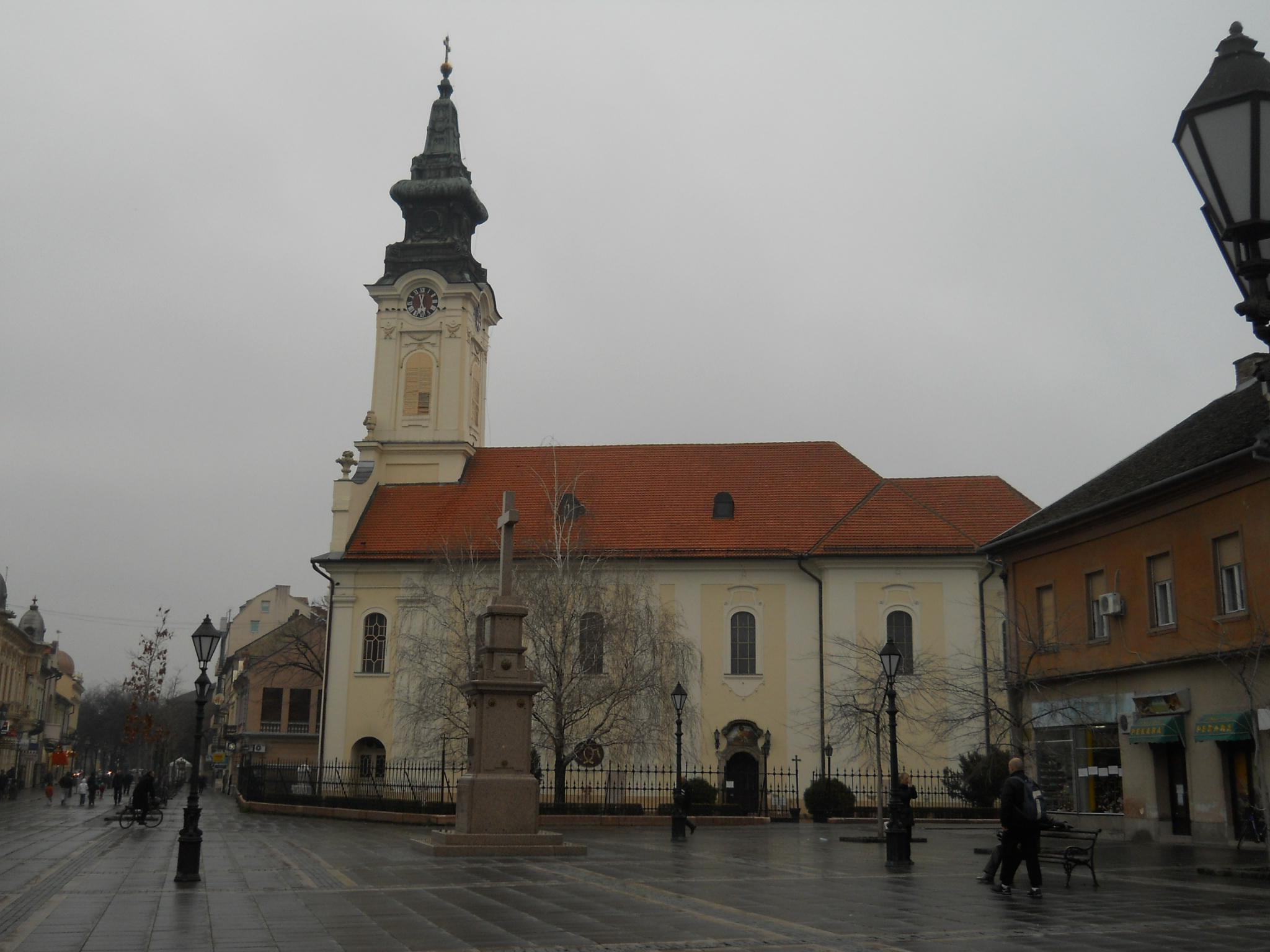 Zombor - Szent György-templom